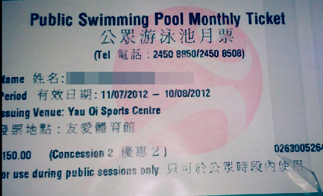 中文（香港）: 香港公眾游泳池月票